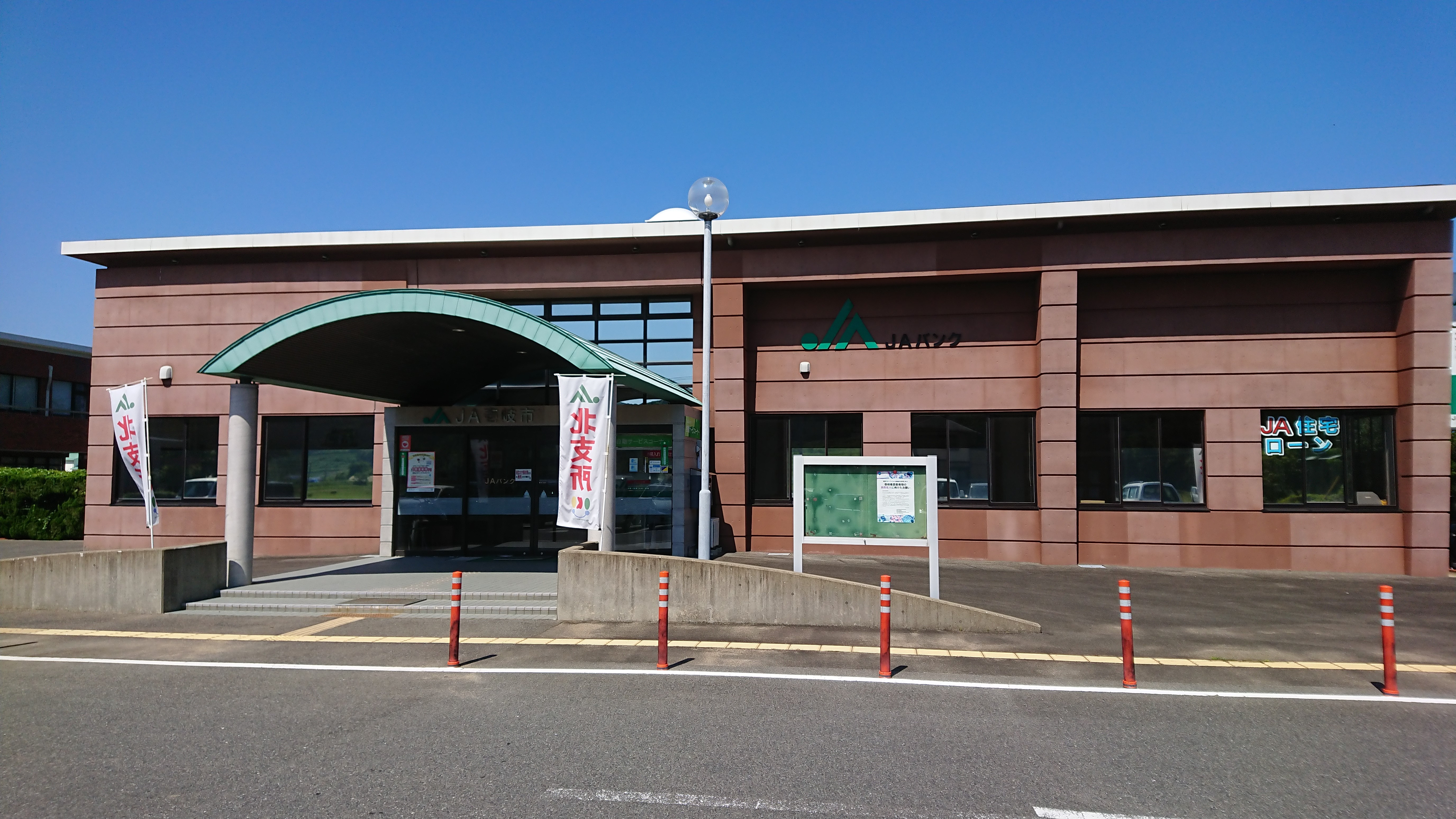 旧・芦辺支所。2020年（令和2年）2月に芦辺支所と勝本支所が統合され、改称。壱岐市農業協同組合（JA壱岐市）の2つある支所のうちの1つ。